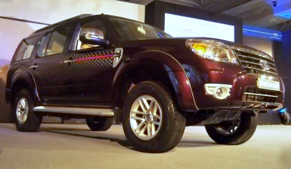 Ford Endeavor